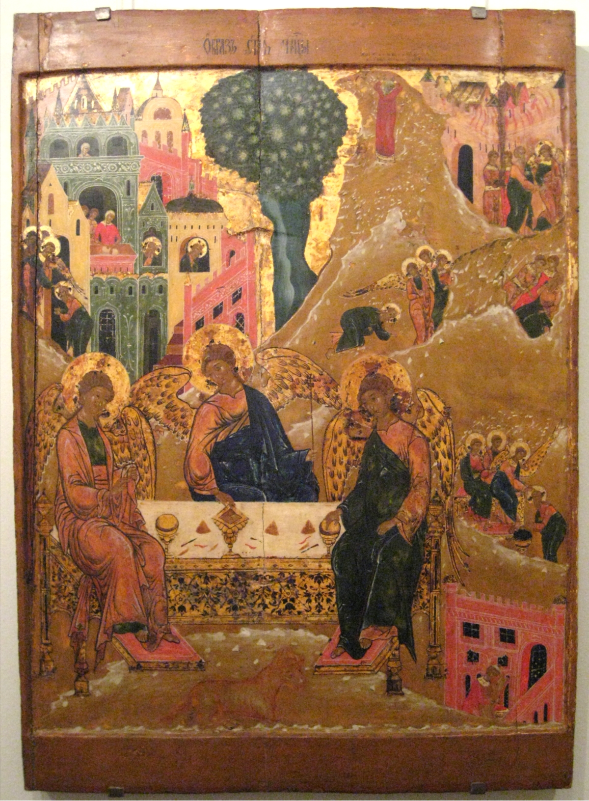 Троица Ветхозаветная с хождением. The Trinity (Old Testament) with the Deeds. Including scenes with Lot, his wife and daughters. Композиция включает сцены хождения Троицы: Авраам встречает ангелов, омывает им ноги, служанка месит тесто, слуга закалывает тельца, Авраам провожает ангелов, ангел выводит Лота с дочерьми из Содома, жена Лота обращается в столп, Лот с дочерьми/ Нижегородский государственный художественный музей/